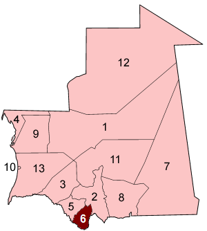 Ghuidimagha region in Mauritania